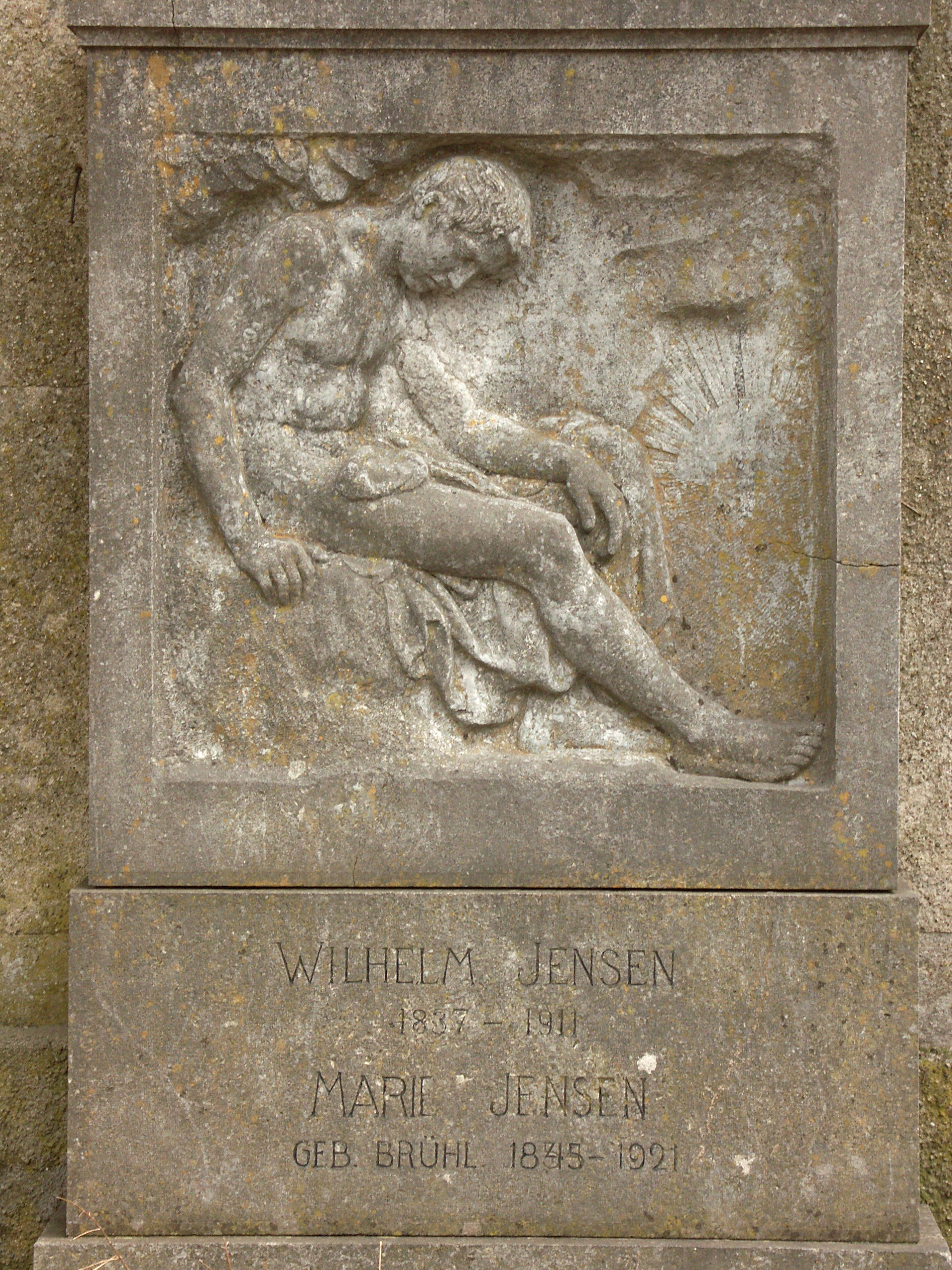 Grabmal von Wilhelm Jensen und seiner Gattin Marie, geschaffen von Bernhard Bleeker, München (ca. 1912)